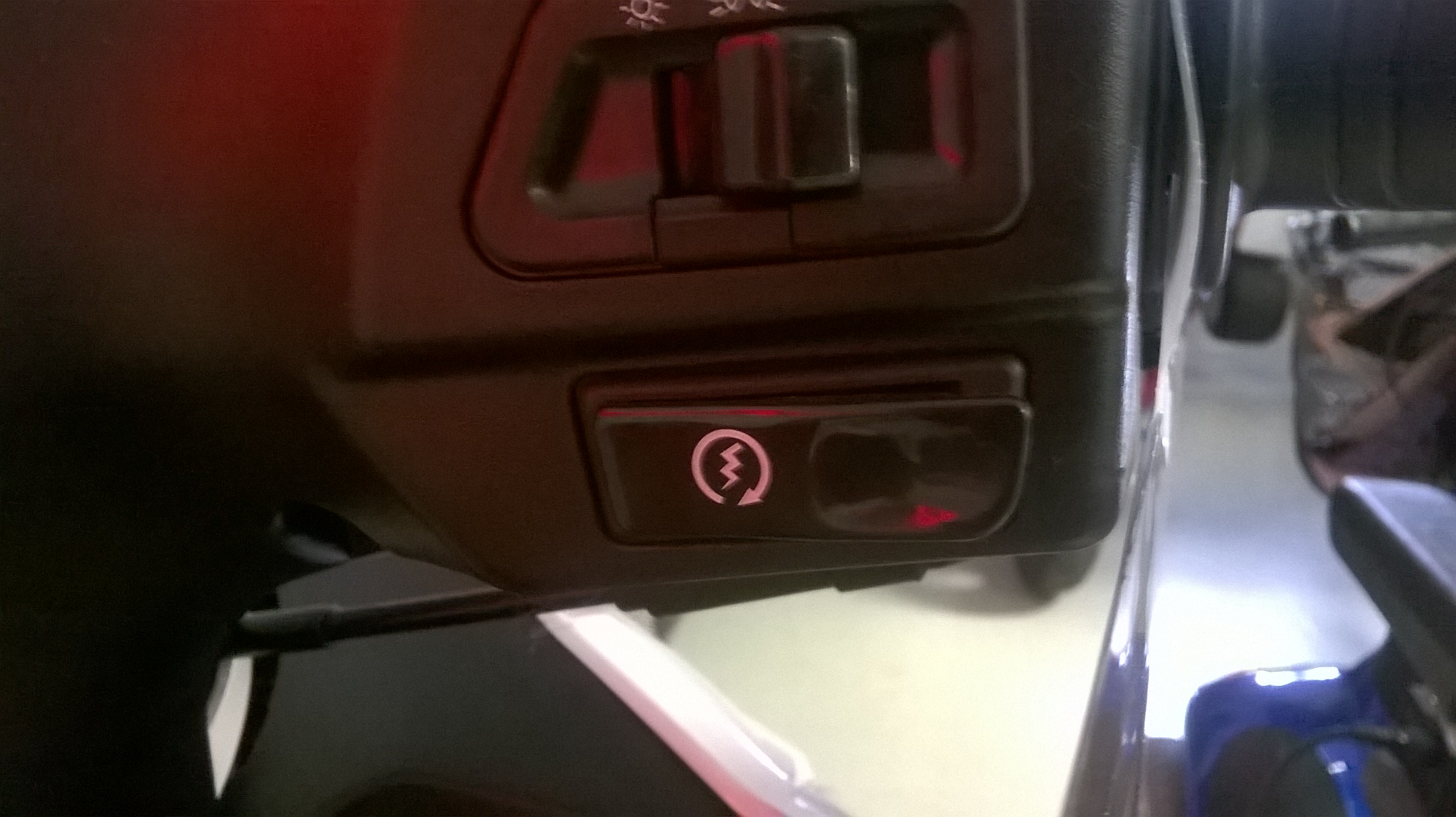 Otin valokuvan erään Sym-merkkisen skootterin käynnistyspainikkeesta. Symissä on tyypillinen skootterin sähkökäynnistin, jossa on salaman ja sen kertavän nuolen kuva.